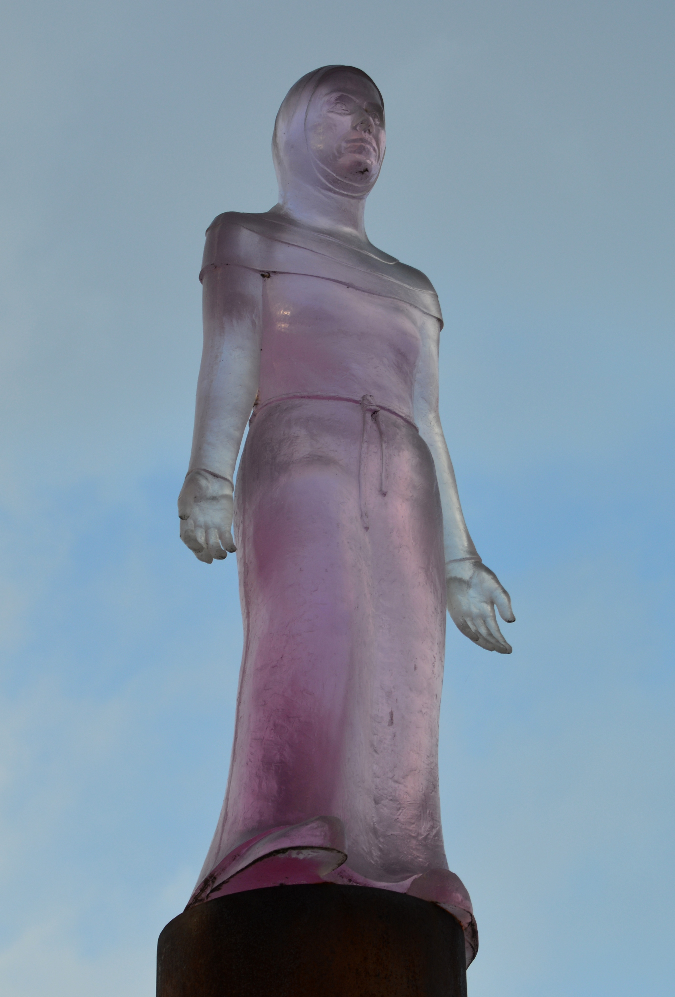 Skulptur Fürstenwall